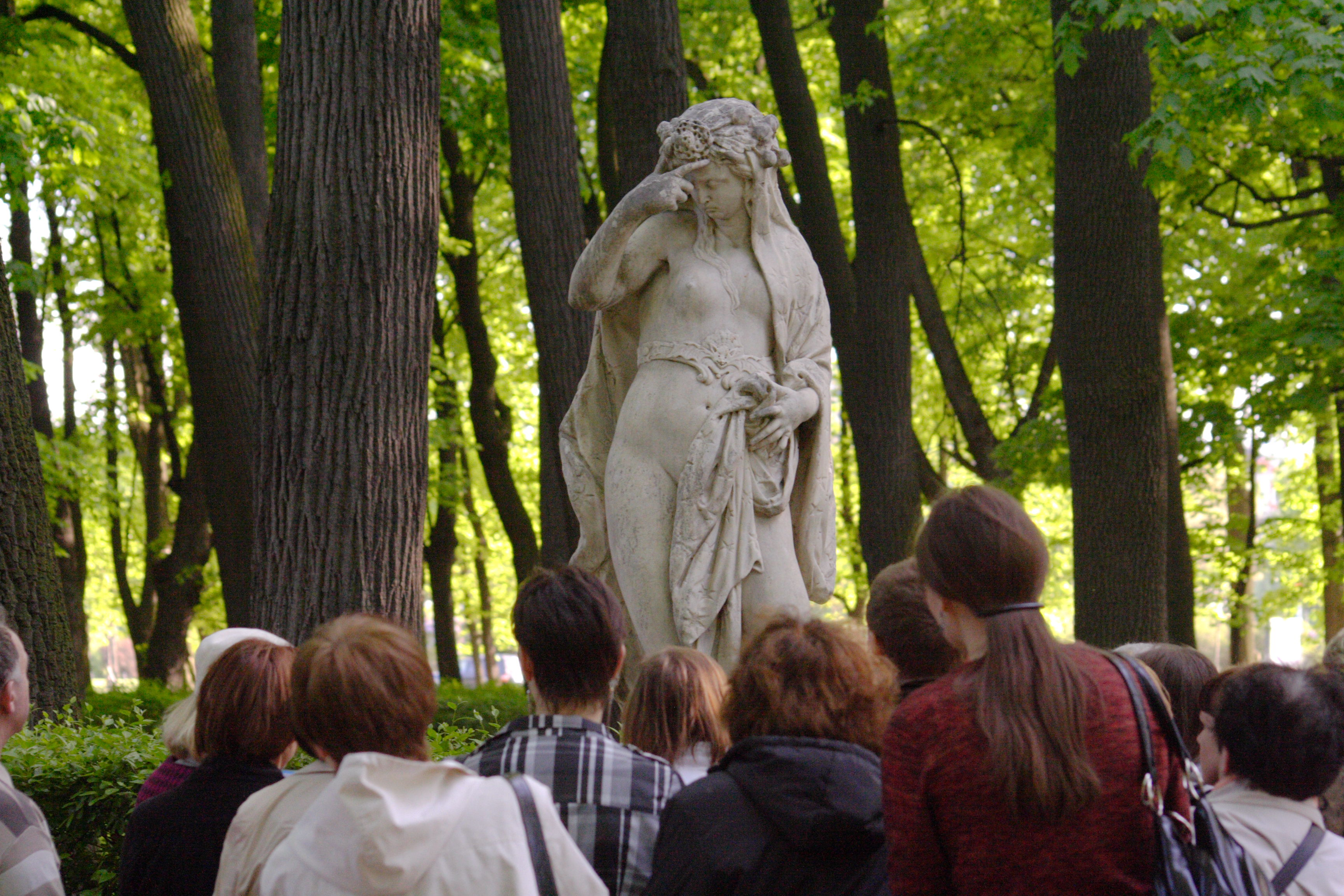 статуя "Ночь"